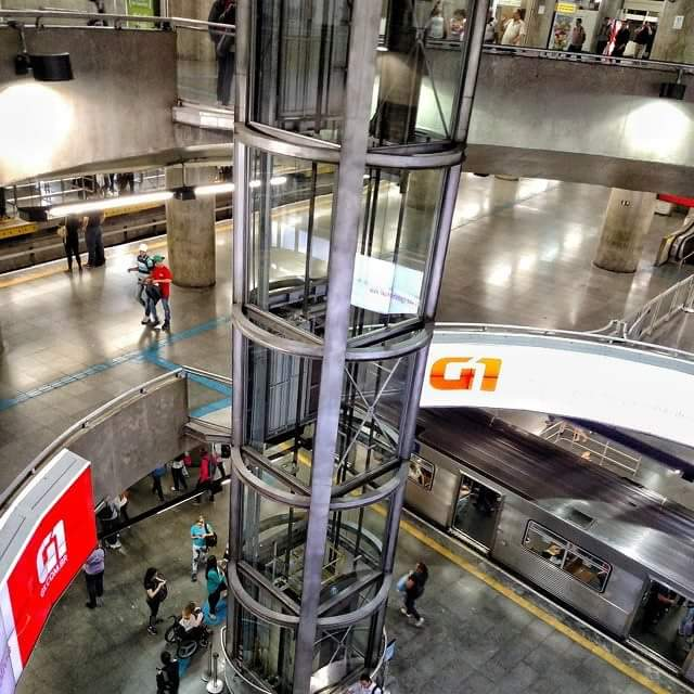 vista do 3 andar da estação central de são paulo